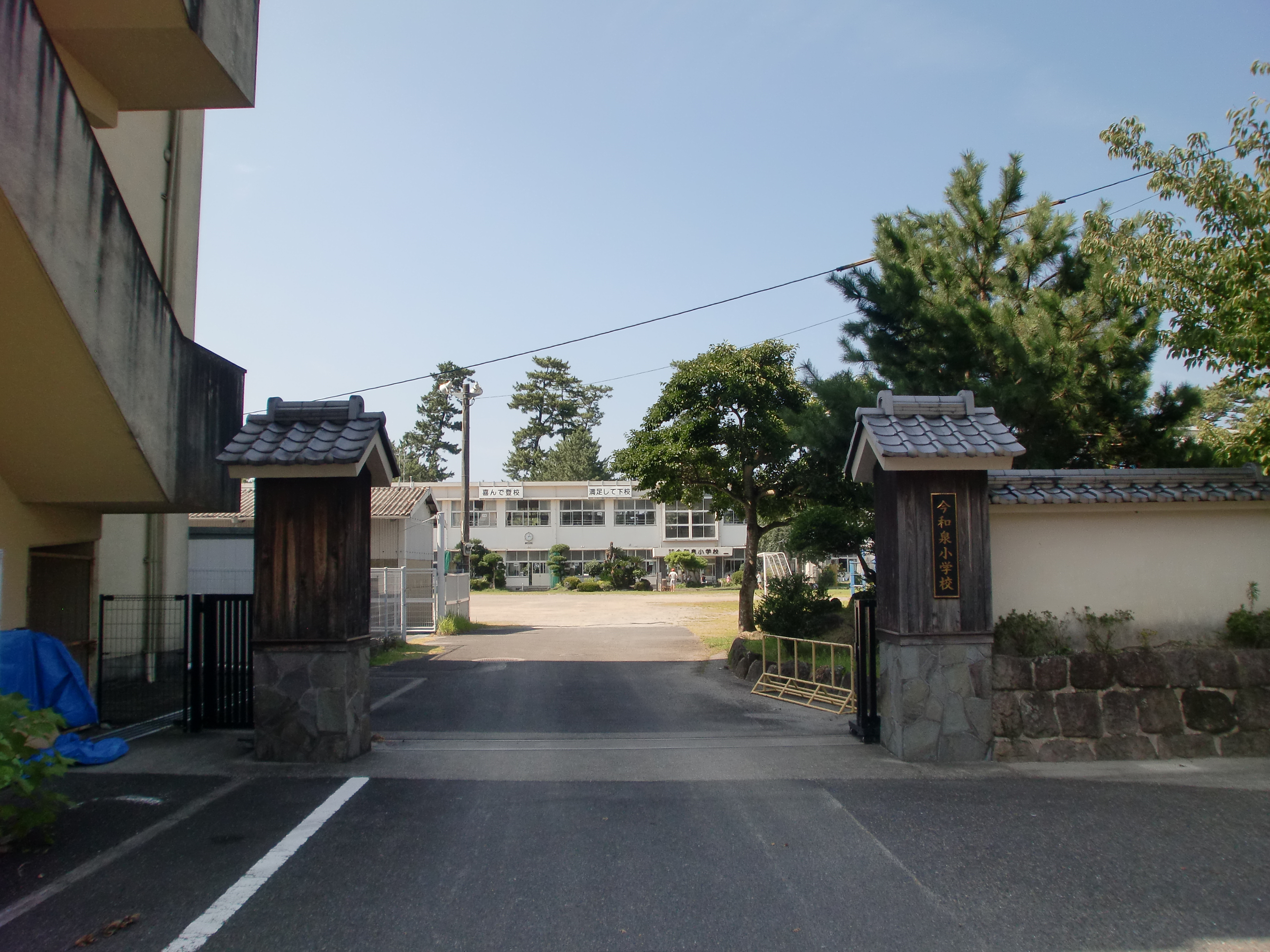 指宿市立今和泉小学校の校門から見た外観。